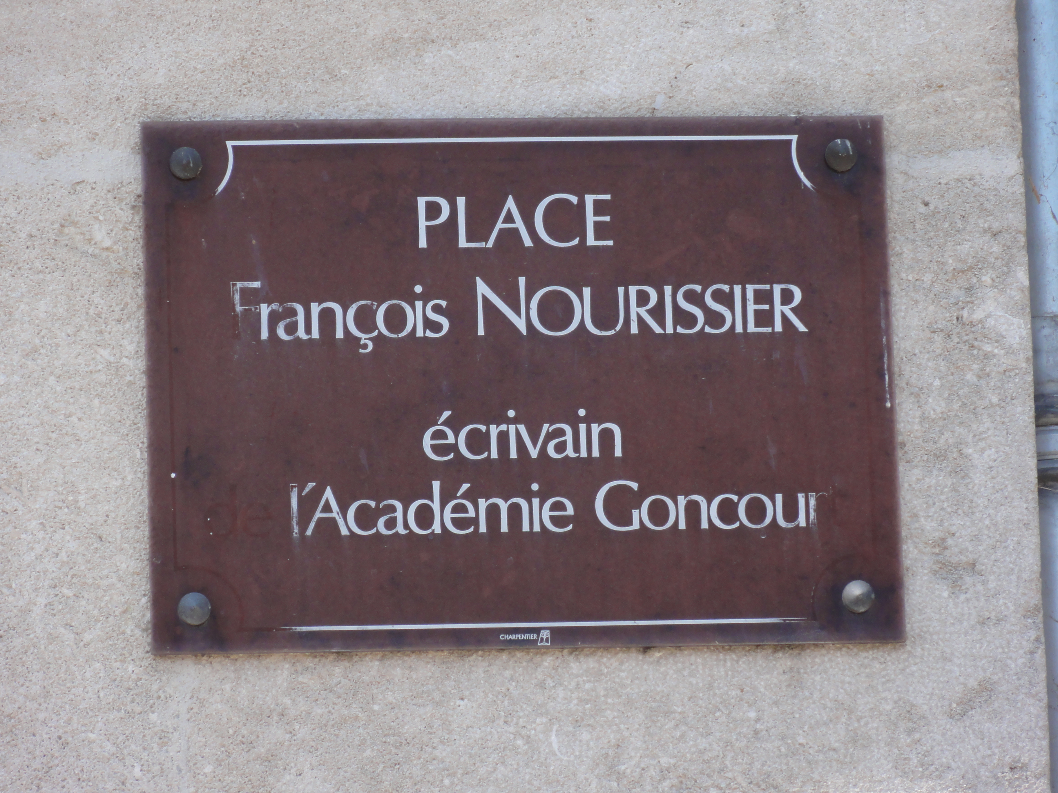 Avocourt (Meuse) plaque Place François Nourissier